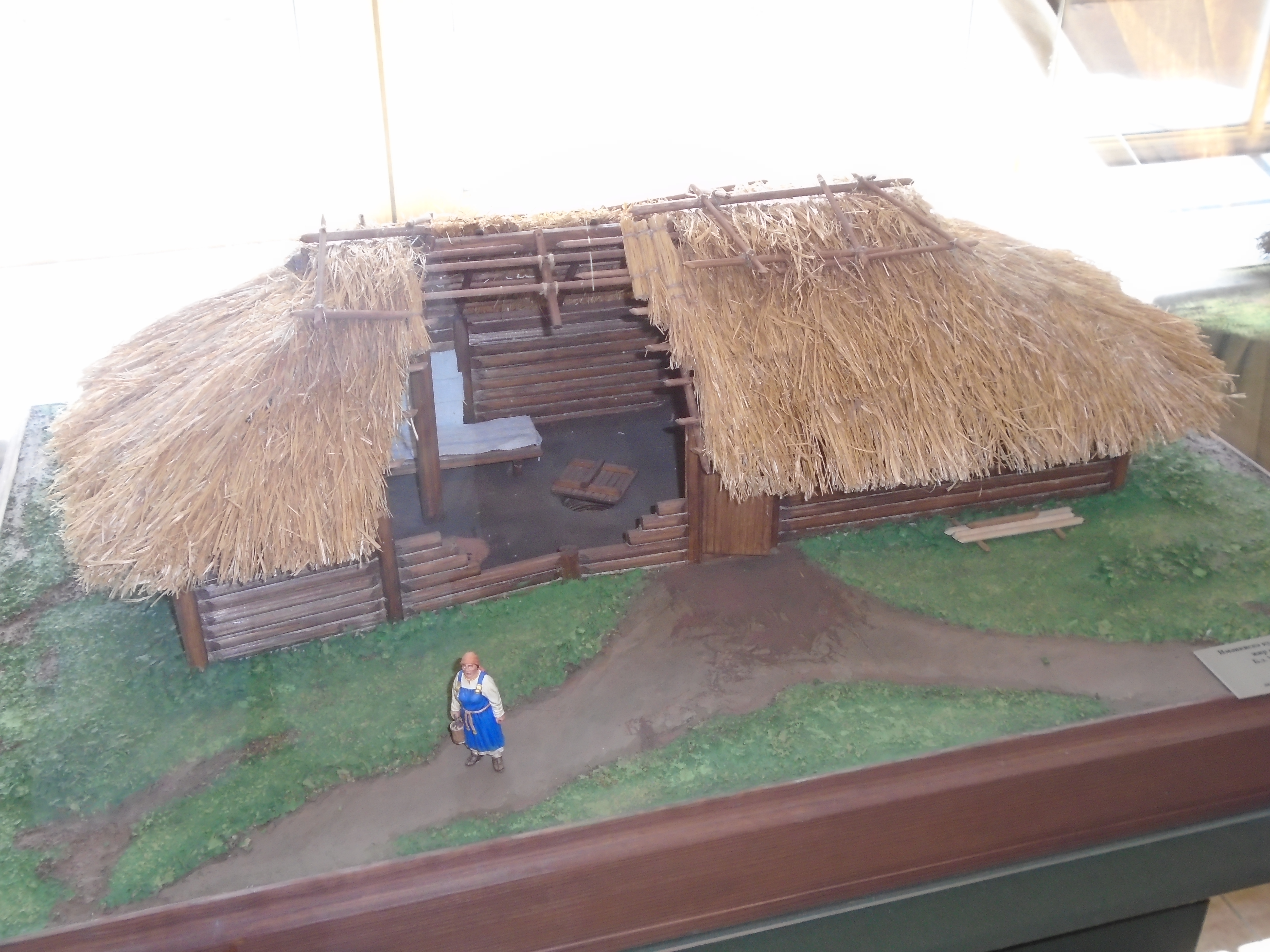 Наземное жилище именьковской культуры V—VII вв. н. э. По материалам Г. И. Матвеевой, Н. А. Лифанова.